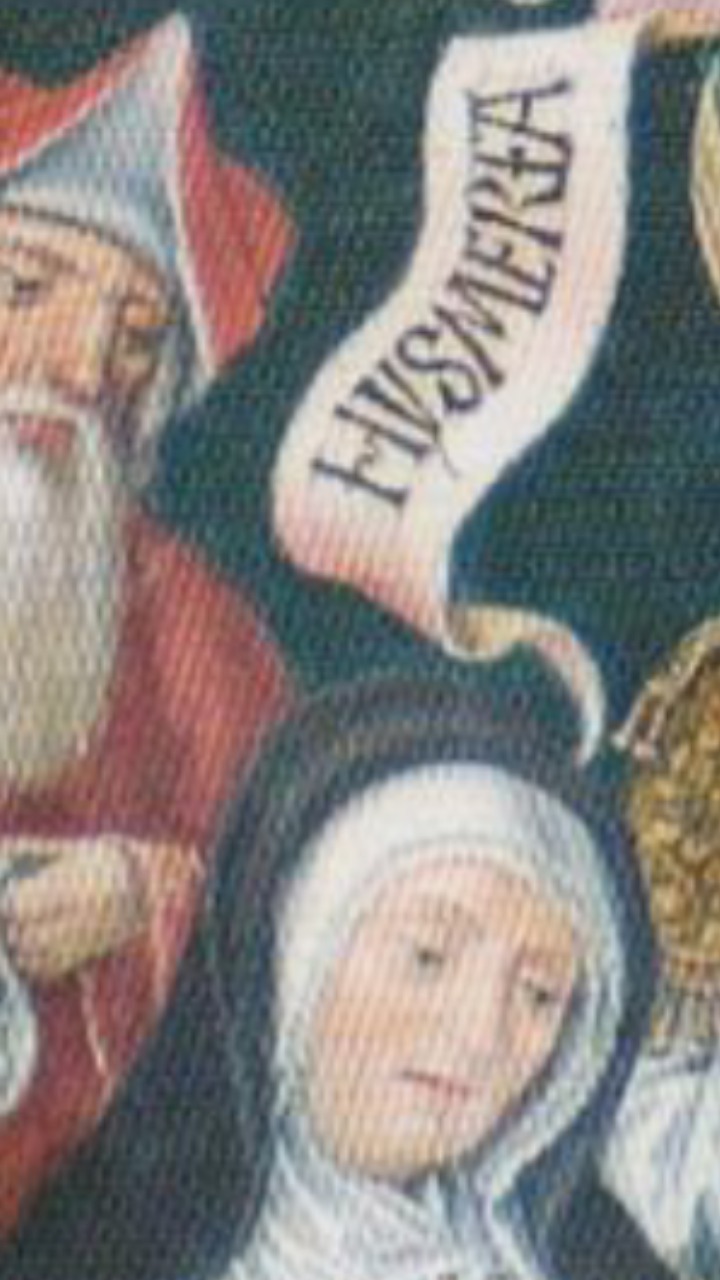 Santa Imperia, sorella di Sant'Anna e madre di Santa Elisabetta